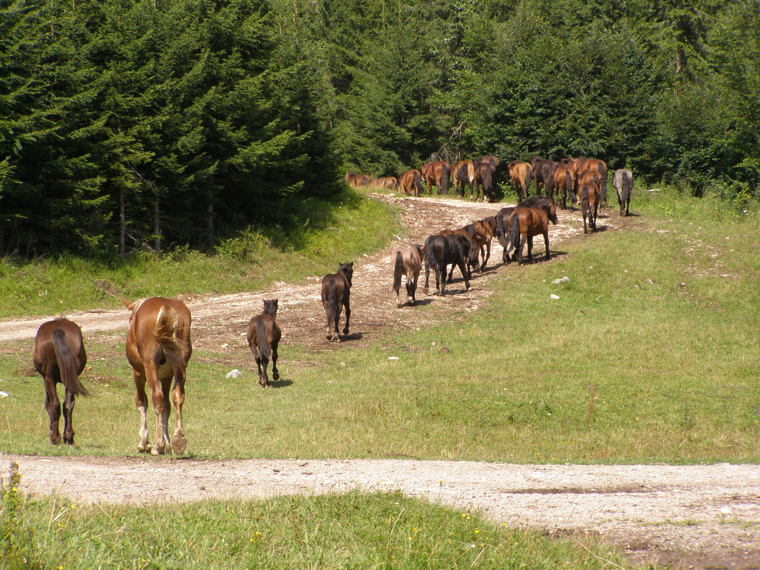 Slovenské rudohoří, Spišsko-gemerský kras, Muráňská planina, Maretkiná, Huculský kůň